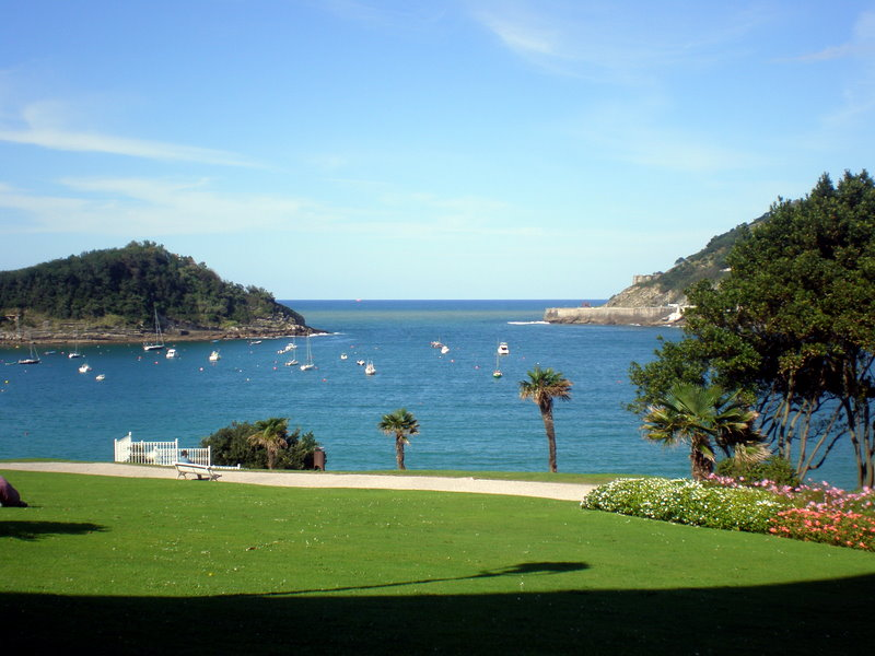 Jardines del Palacio Miramar, en San Sebastián (España)